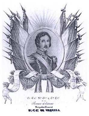 Cuadro alegórico de Justo José de Urquiza